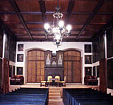 Der Ahnensaal bildet das Herzstück des Starhemberger Schlossmuseums. 50 überlebensgroße Bilder entlang den Wänden des Ahnensaals zeigen die Angehörigen der Familie.